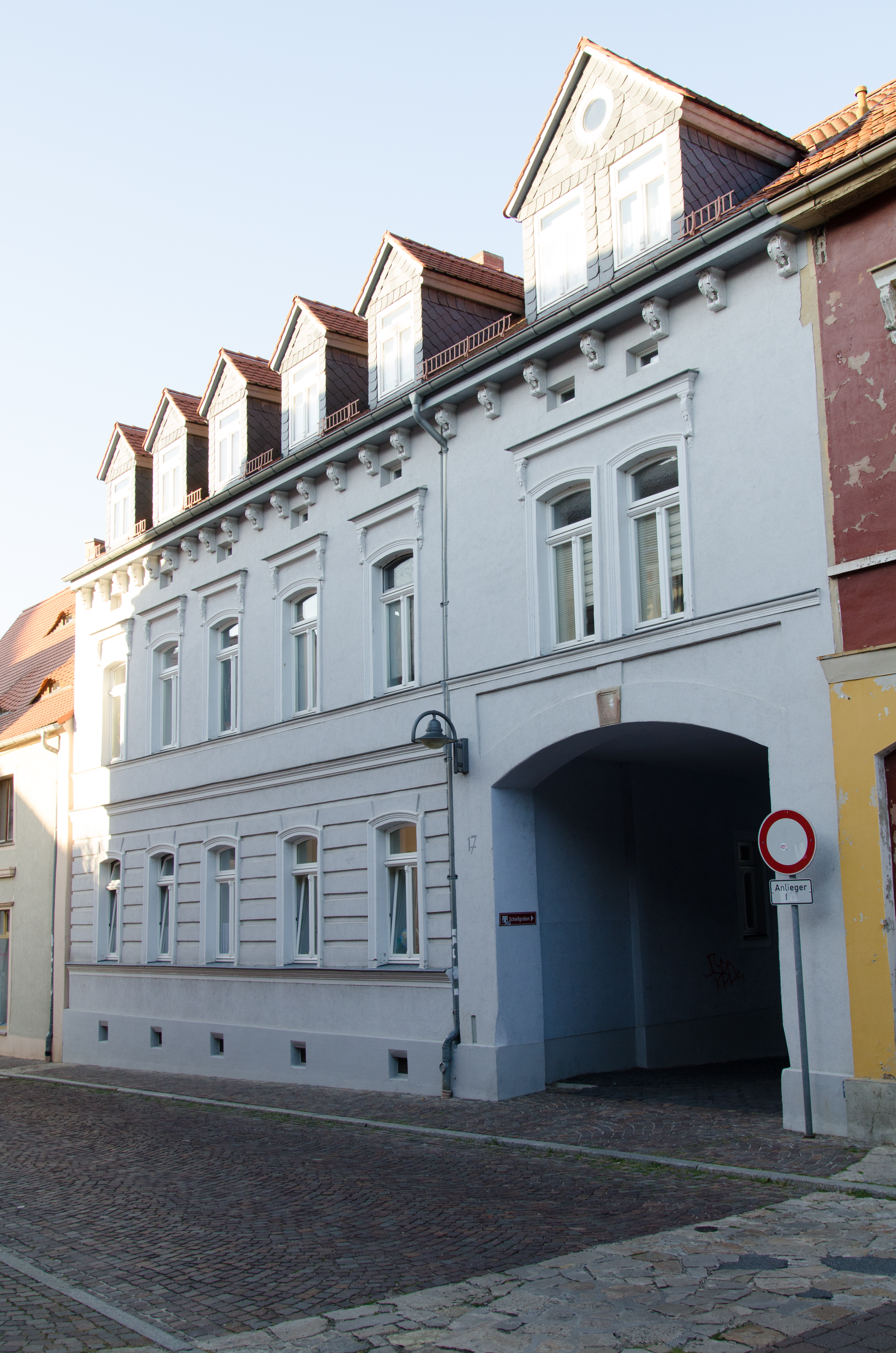 Querfurt, Nebraer Straße 17